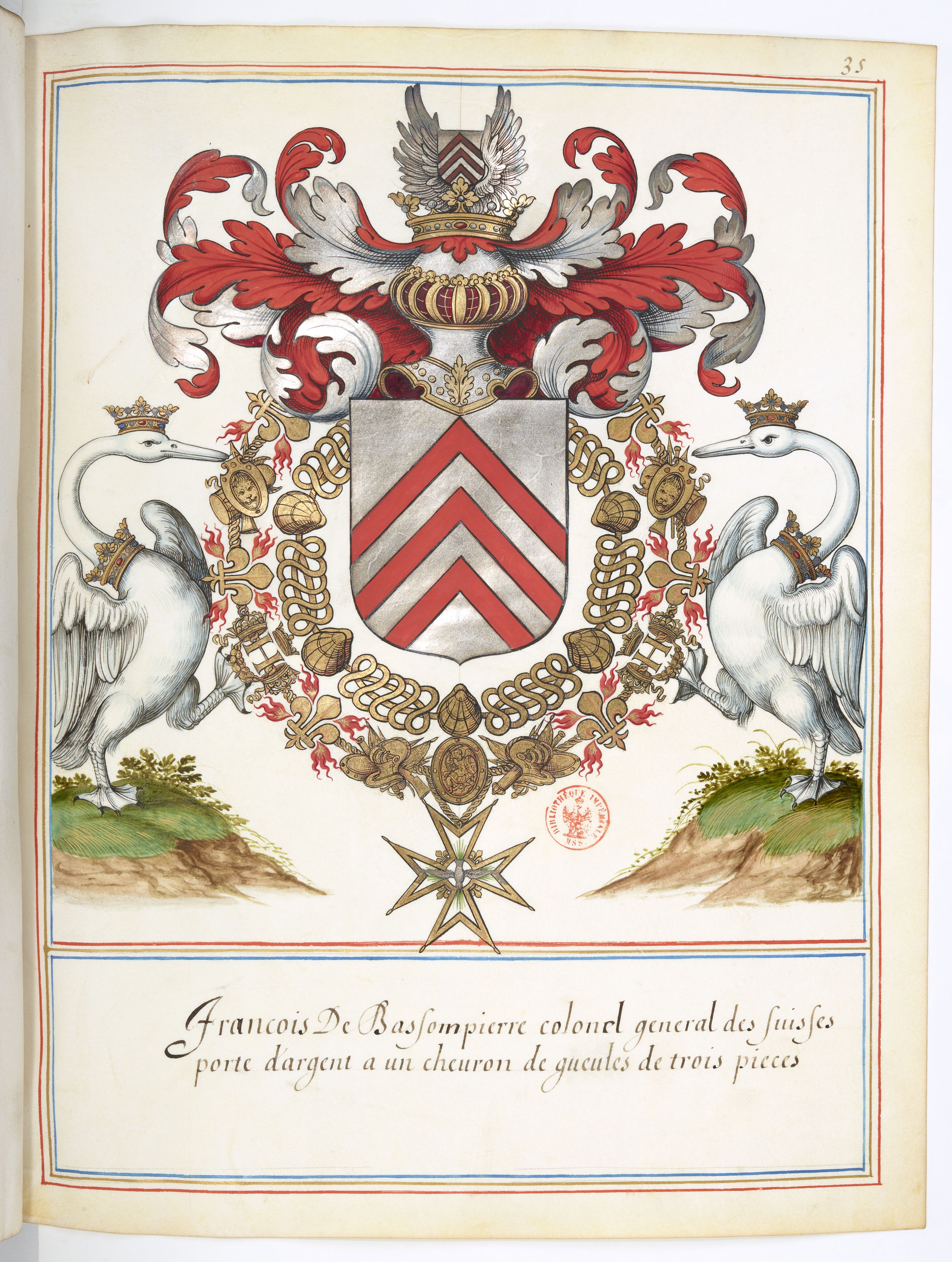 Armes de François de Bassompierre